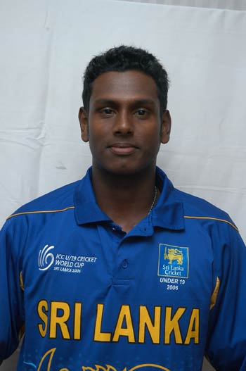 Angelo Mathews